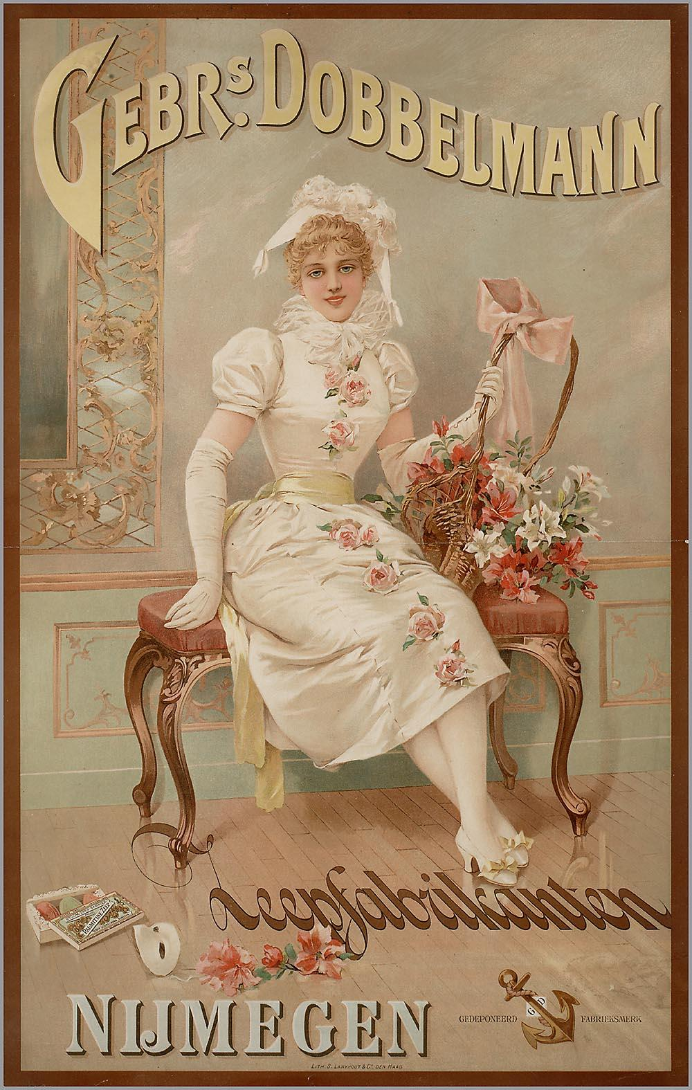 Affiche: Gebr. Dobbelmann. Zeepfabrikanten. Nijmegen. Drukker: Lankhout, Lith., Den Haag.